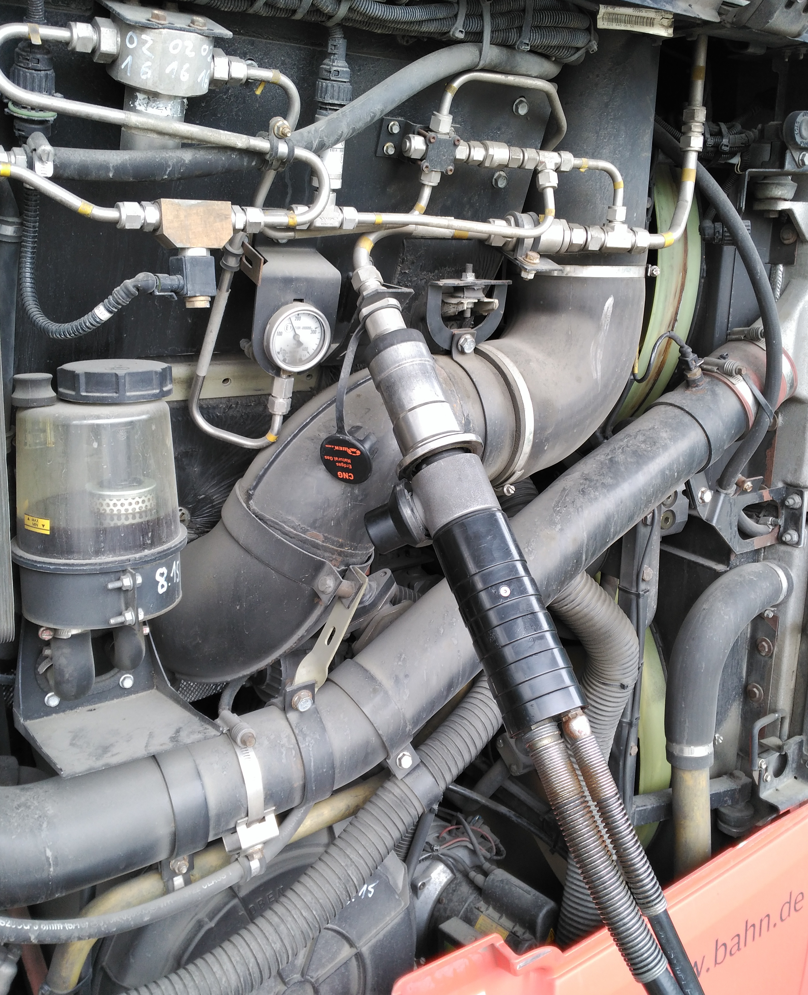 Erdgasbus (CNG) in Ravensburg beim Betanken, Einfüllstutzen NGV2